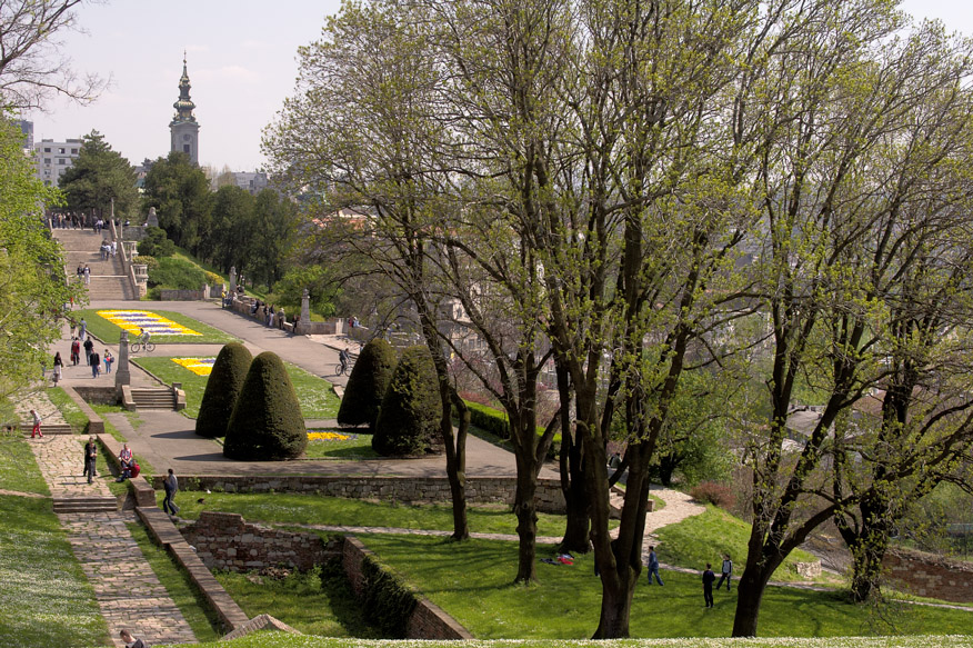 Le parc Kalemegdan, Belgrade, Serbie